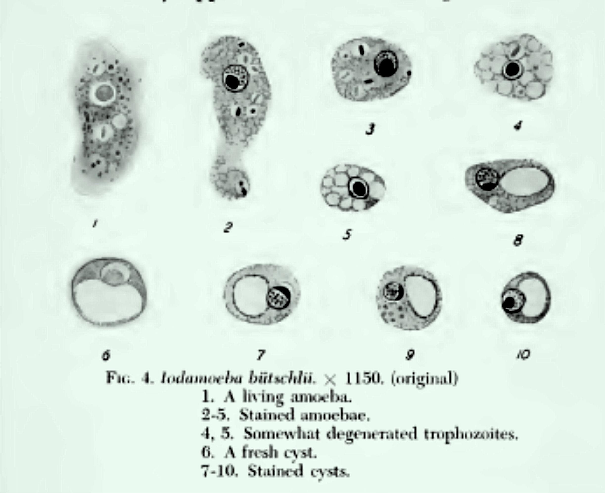 drawing in textbook